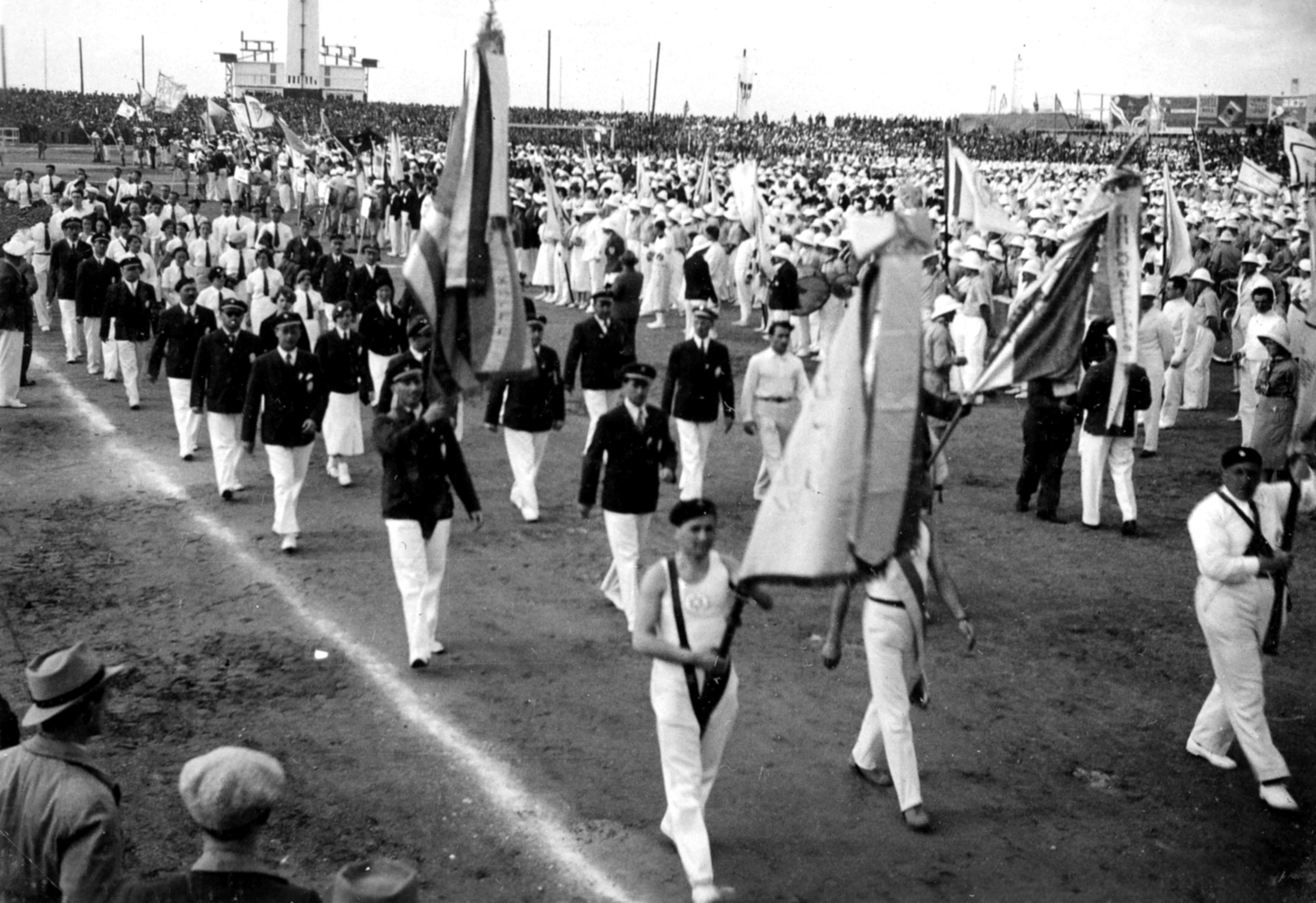 אוסף דוד עופר - המכביה השניה ; פריט מספר 81